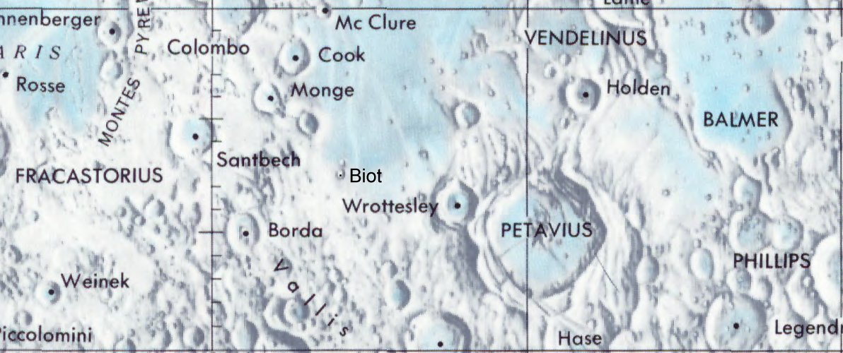 Cráter lunar Biot. Localización. (Lunar Chart LPC1. Second Edition)